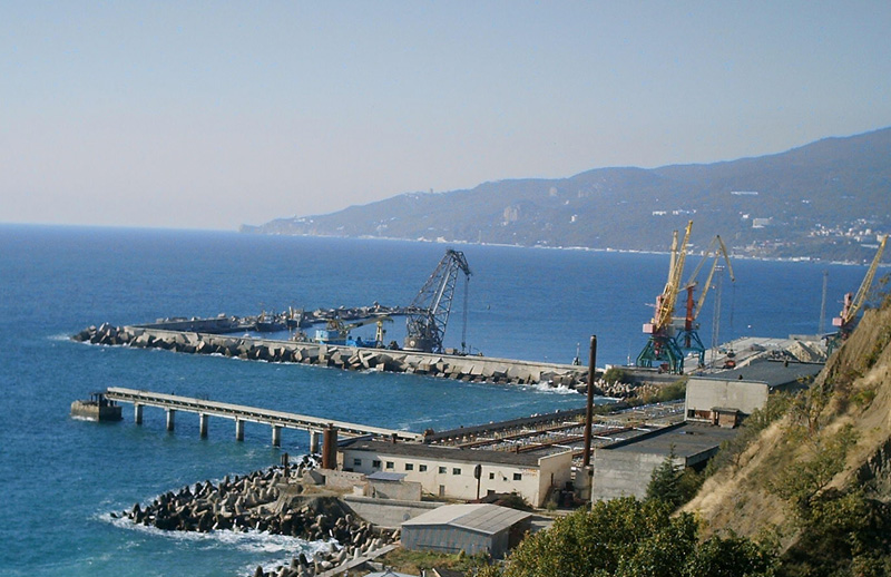 Ялтинский порт, вид из поселка Прибрежный